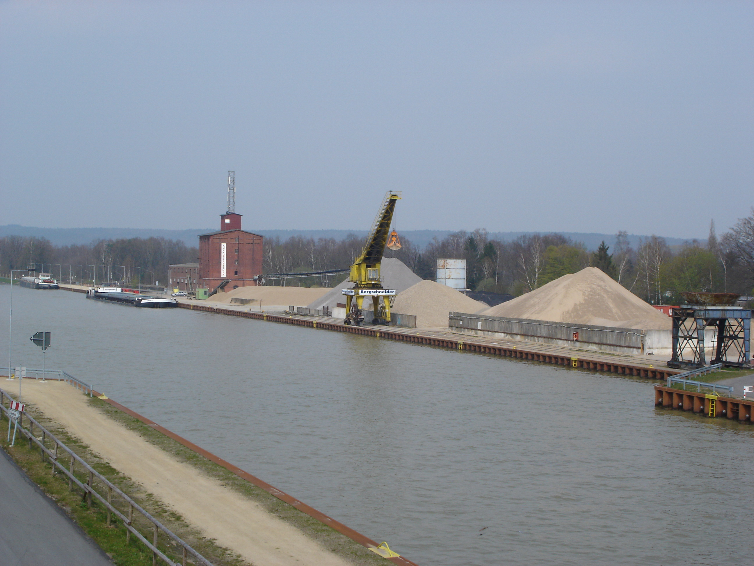 Ibbenbüren, Hafen im Stadtteil Dörenthe.